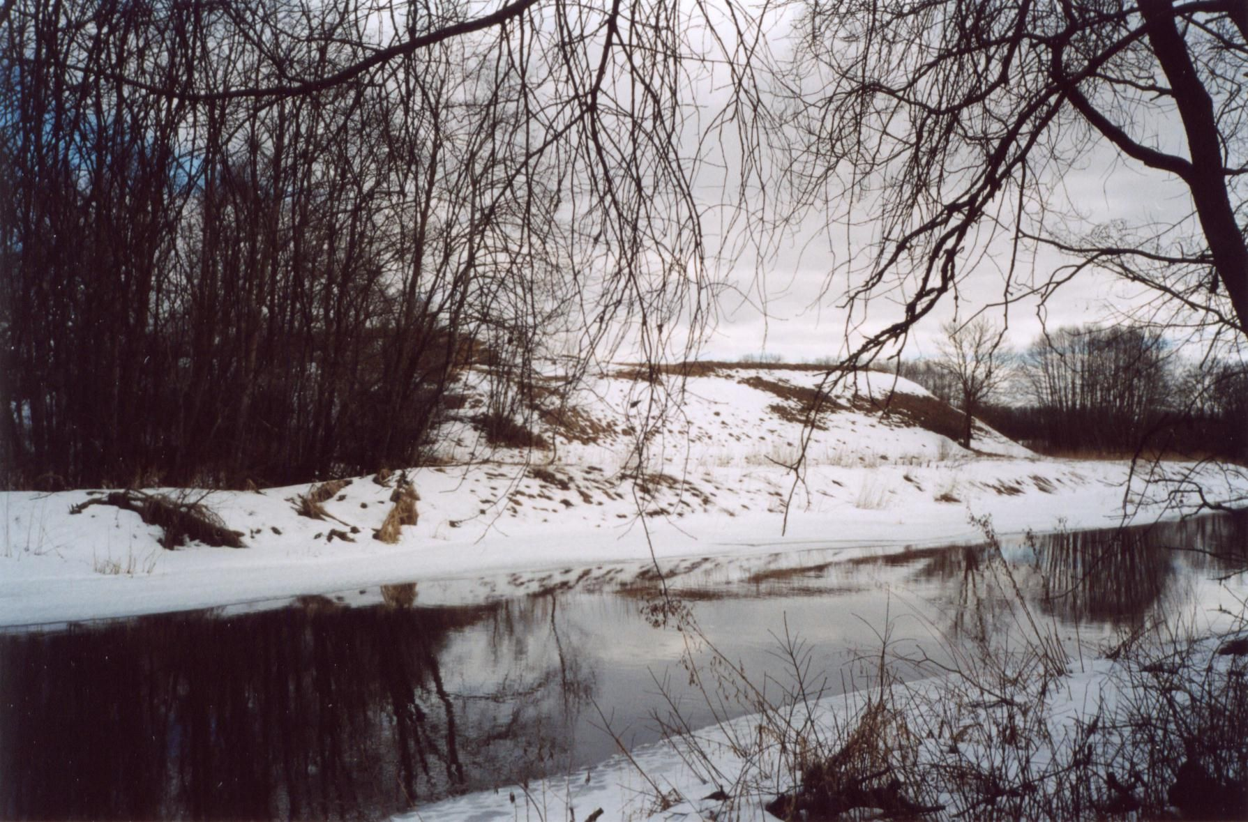 Varangu Veskikants